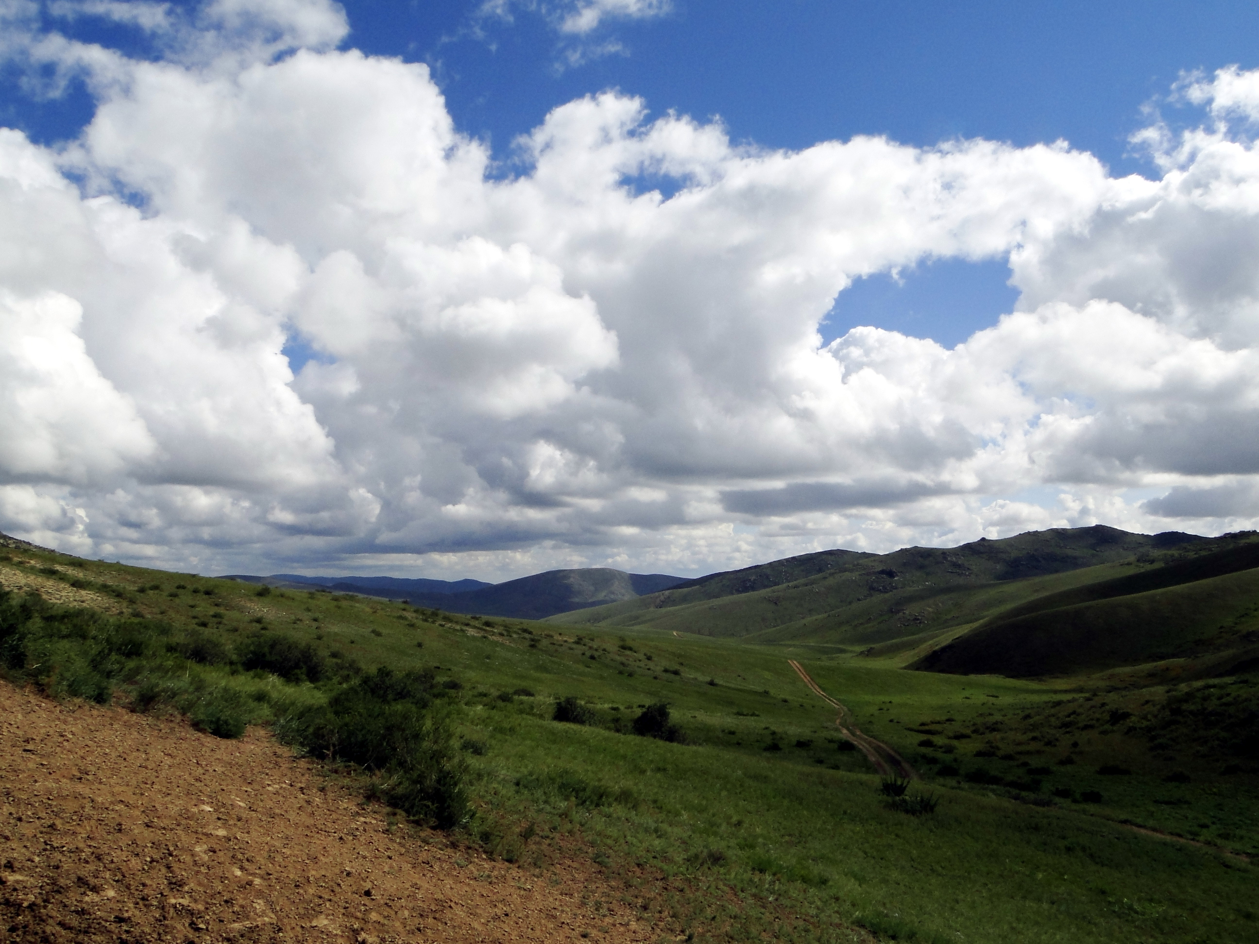 Mongolian Steppes